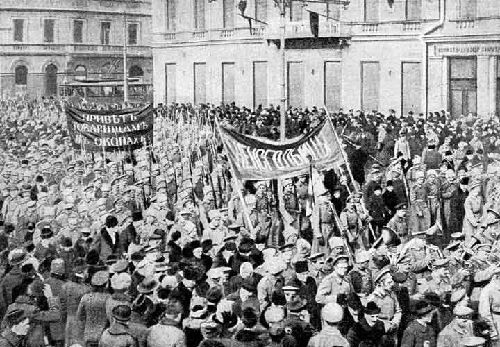 Fra Februarrevolusjonen i 1917: soldater demonstrerer i Petrograd.